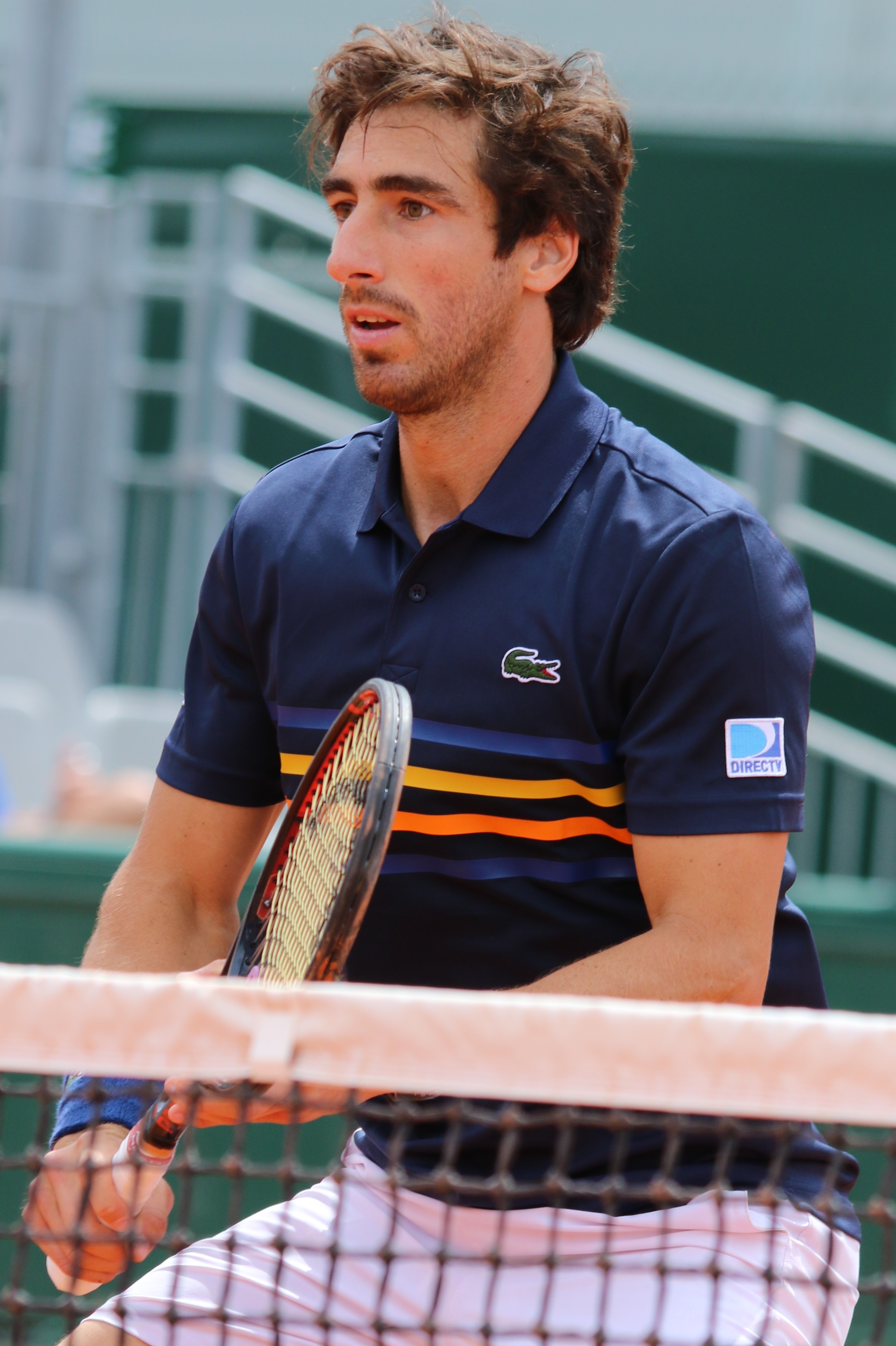 Cuevas RG18 (16)